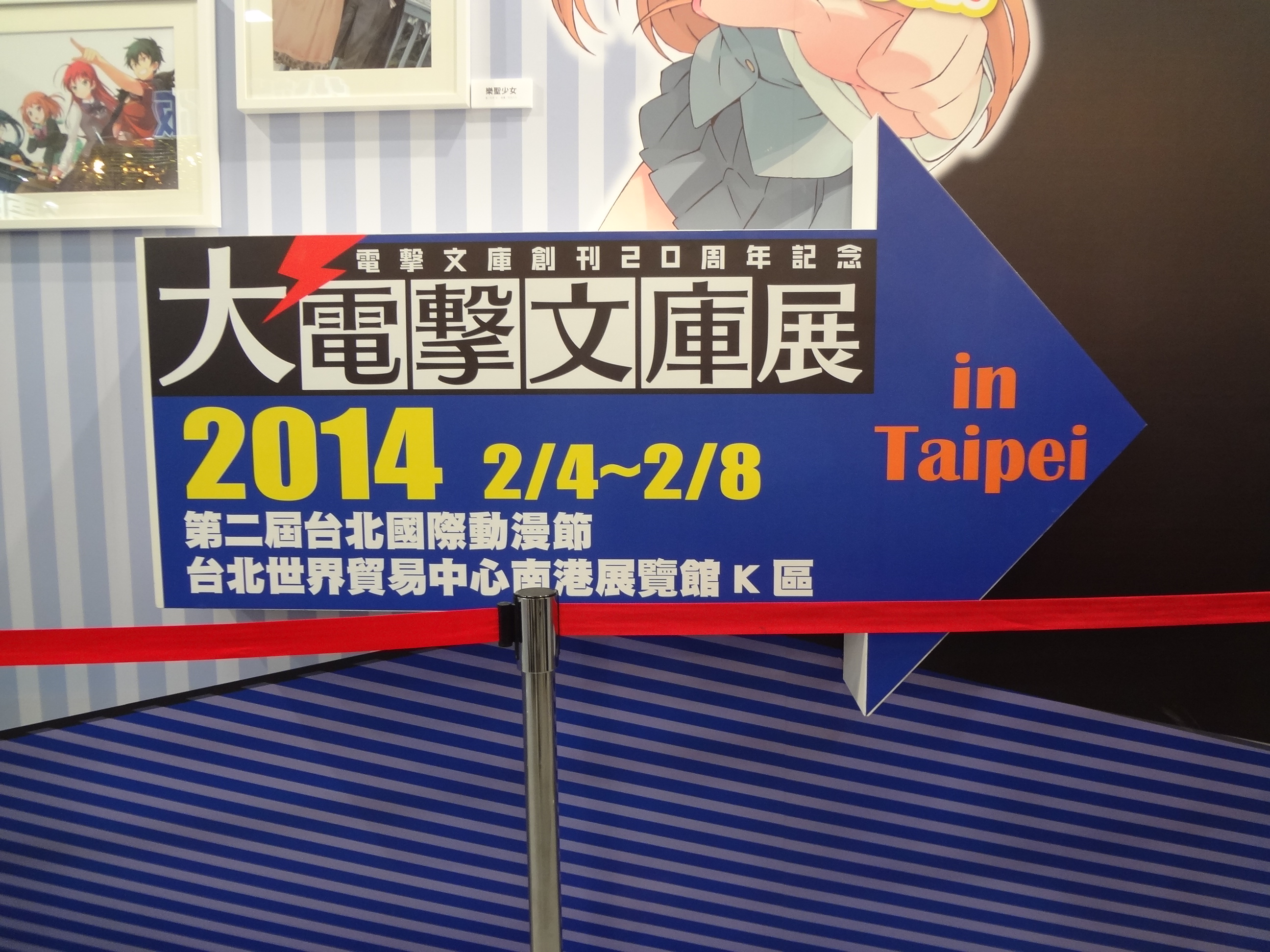 2013年（第14屆）漫畫博覽會，台灣角川書店攤位設置的「大電擊文庫展 in Taipei」招牌。